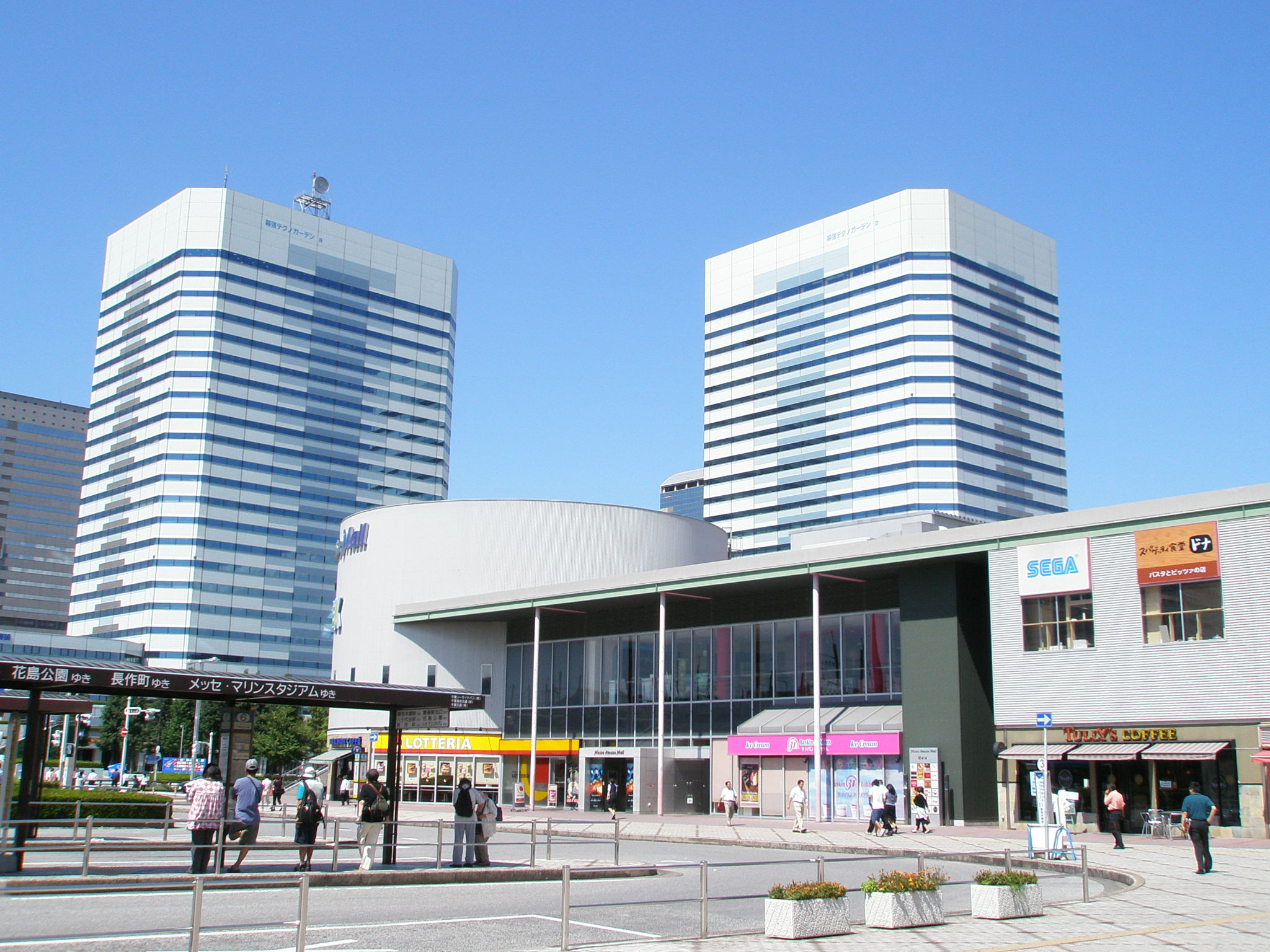 海浜幕張駅北口駅前広場と幕張テクノガーデン